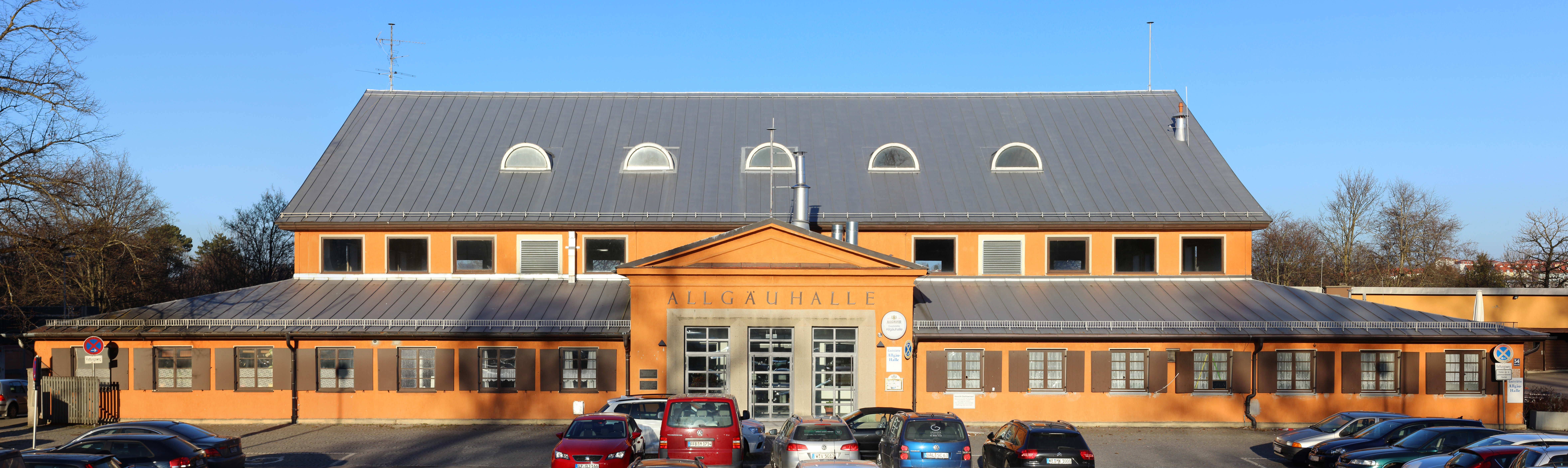 Allgäuhalle (Tierzuchtalle) in Kempten